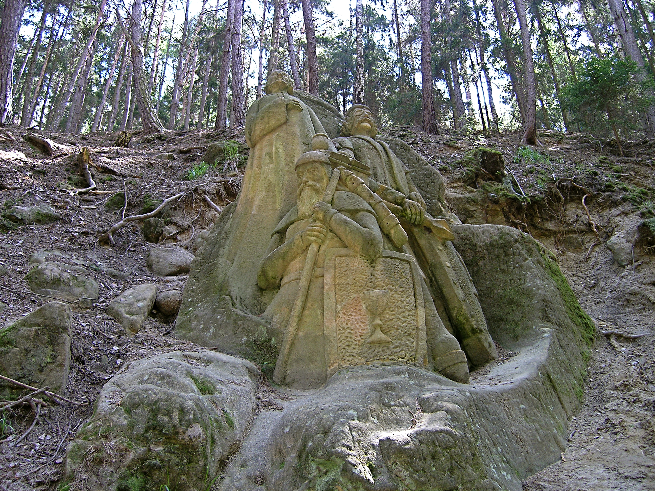 Česky: Sousoší husitských osobností - Jan Žižka, Jan Hus, Prokop Holý – na východní straně Velkého Chlumu u Bořitova. Sochař Stanislav Rolinek z Bořitova. - OpenStreetMap(Info)